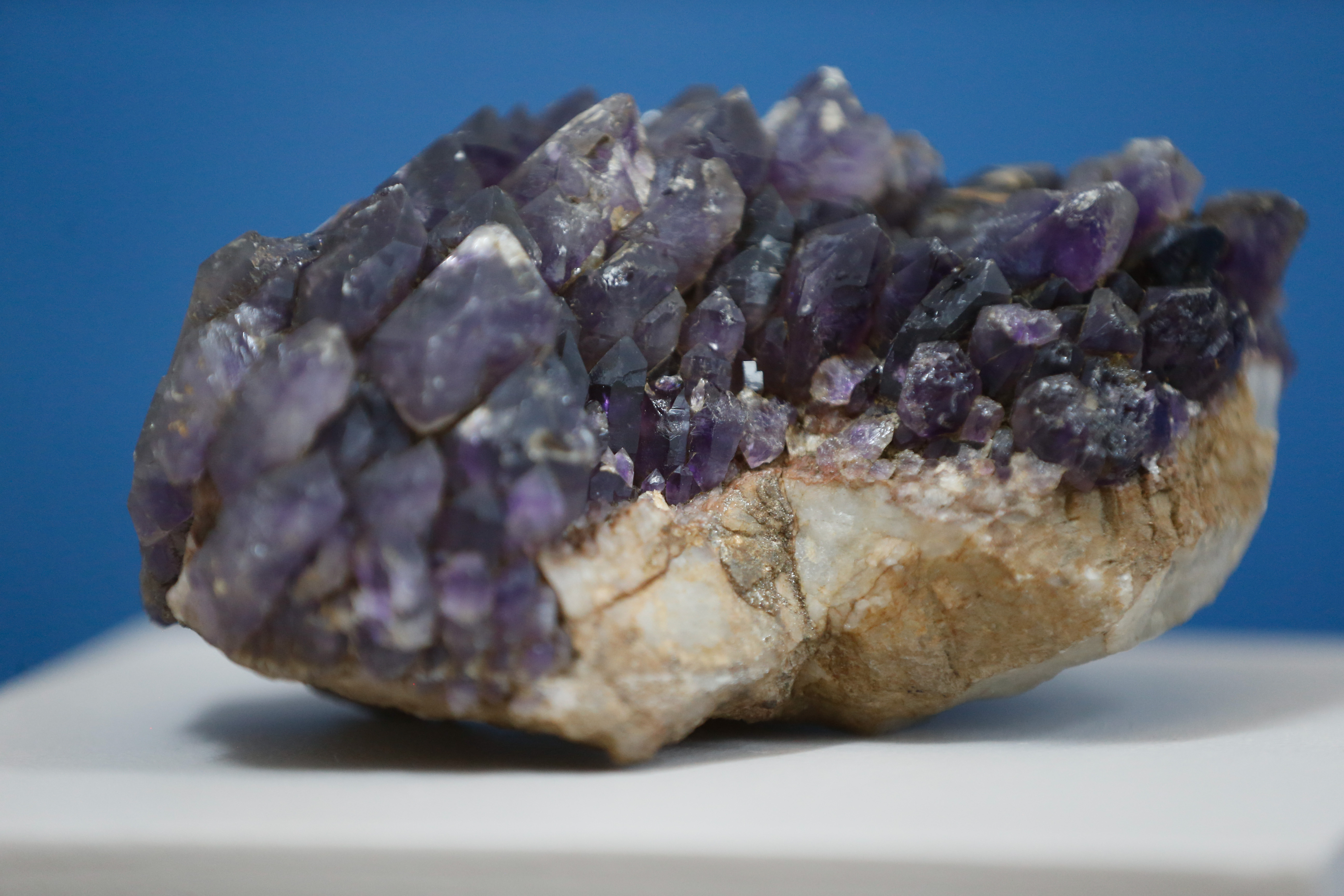 Rio de Janeiro - Exemplar de quartzo ametista entre os Minerais da Coleção Werner, trazidos para o Brasil pela Família Real Portuguesa, em fuga após invasão de tropas francesas de Napoleão Bonaparte, que estão em exposição no Museu Nacional (Fernando Frazão/Agência Brasil)